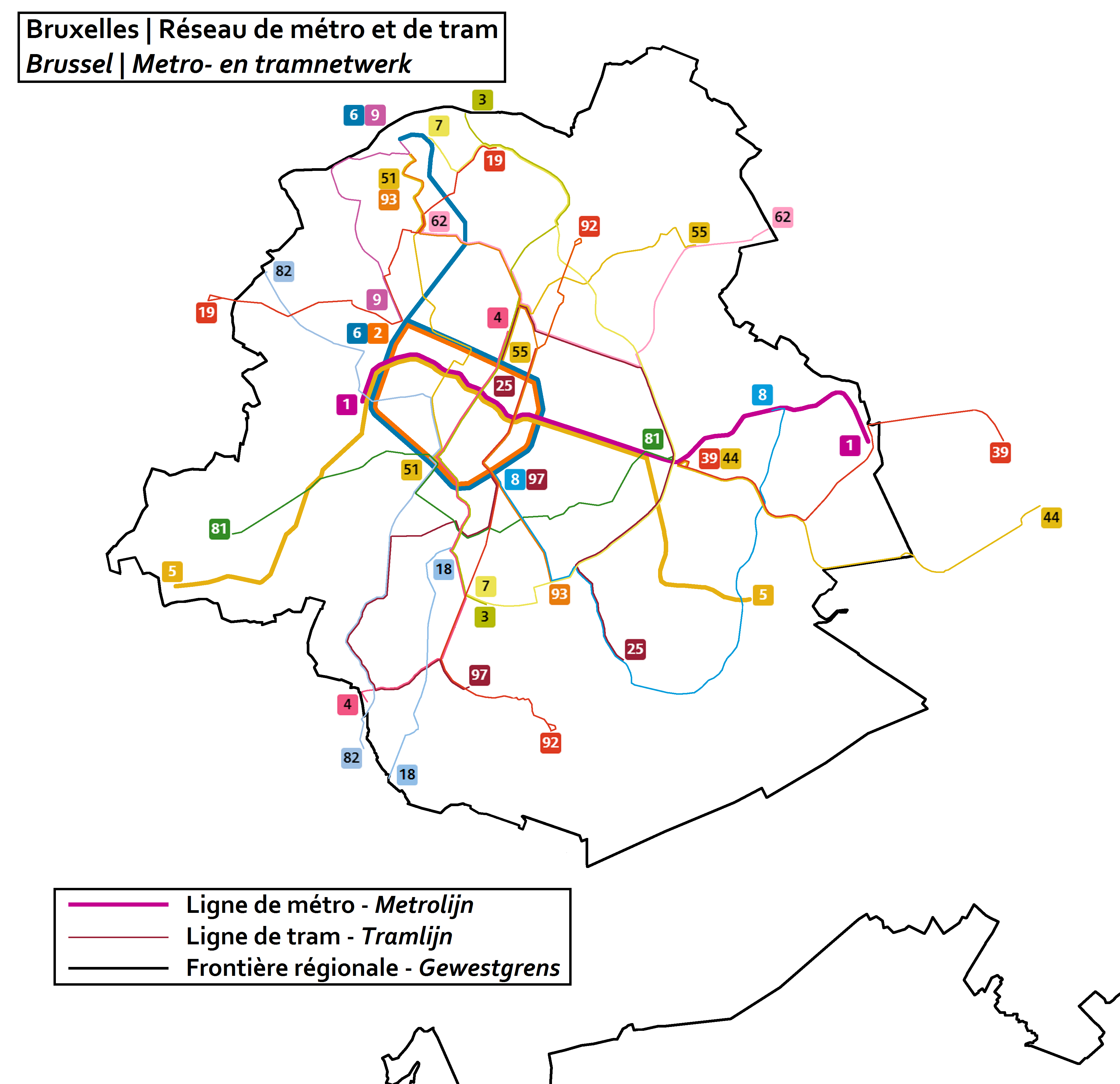 Réseau de métro et de tram bruxellois (STIB). Seules les lignes exploitées en journée apparaissent.